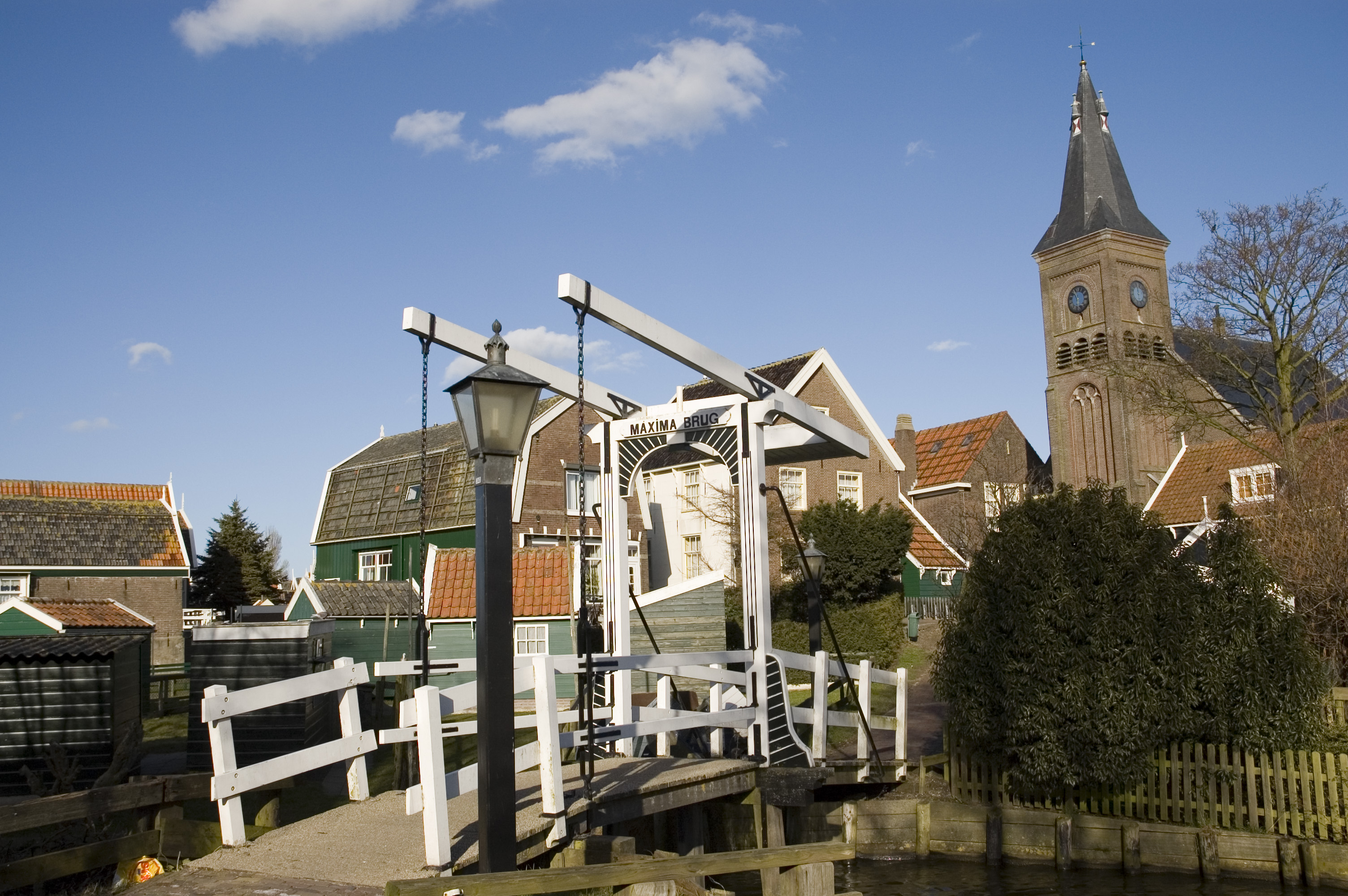 Ophaalbruggetje, Kerkbuurt Marken